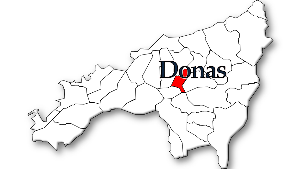 População